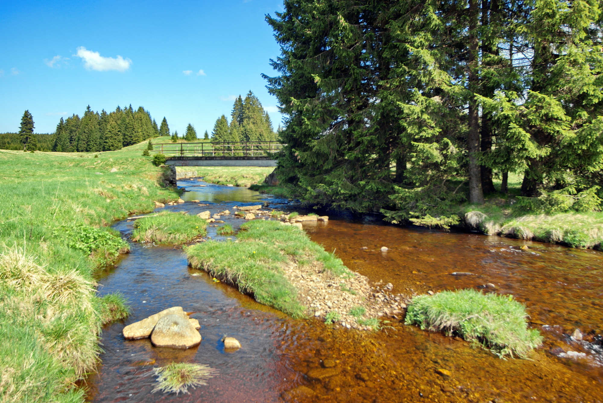 Říčka Černá (Schwarzwasser) v místě zaniklé obce Háje, Krušné hory, okres Karlovy Vary